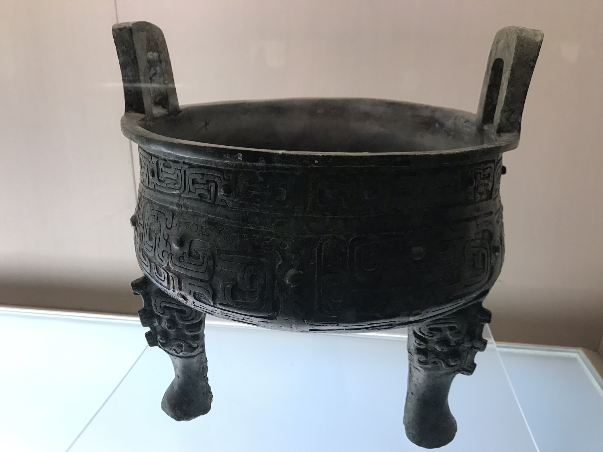 中文（中国大陆）: 西周晚期秦公鼎